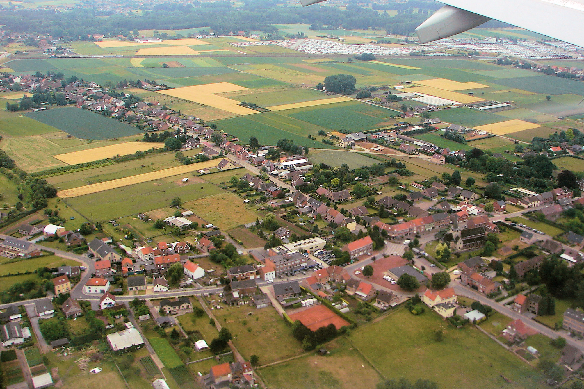 Erps-Kwerps, Belgium